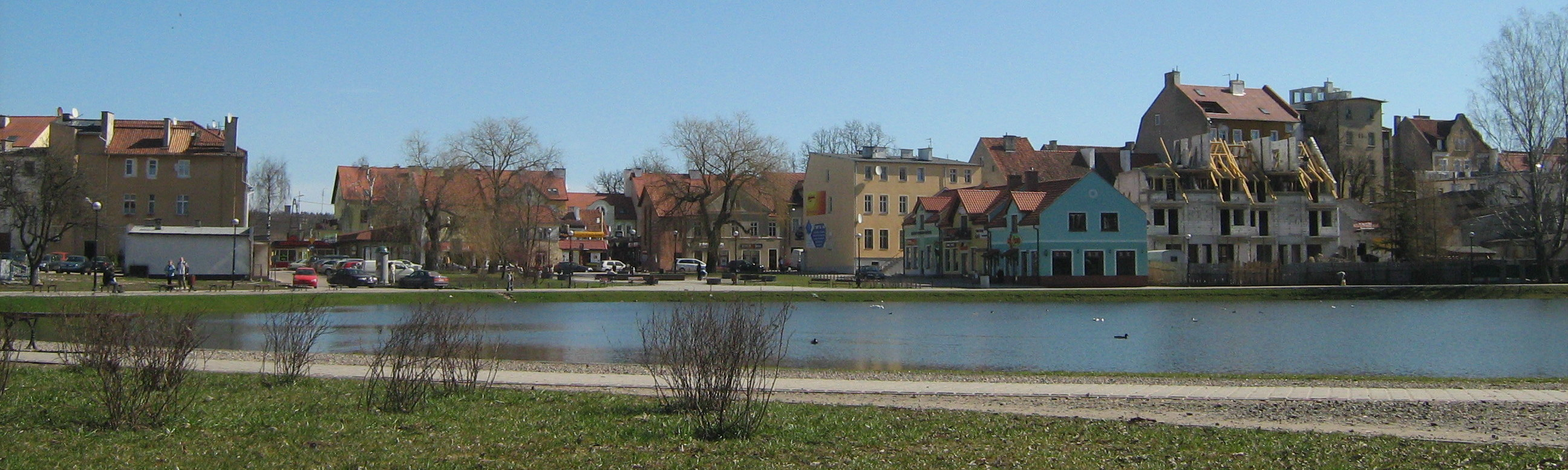 Mrągowo - jezioro Magistrackie